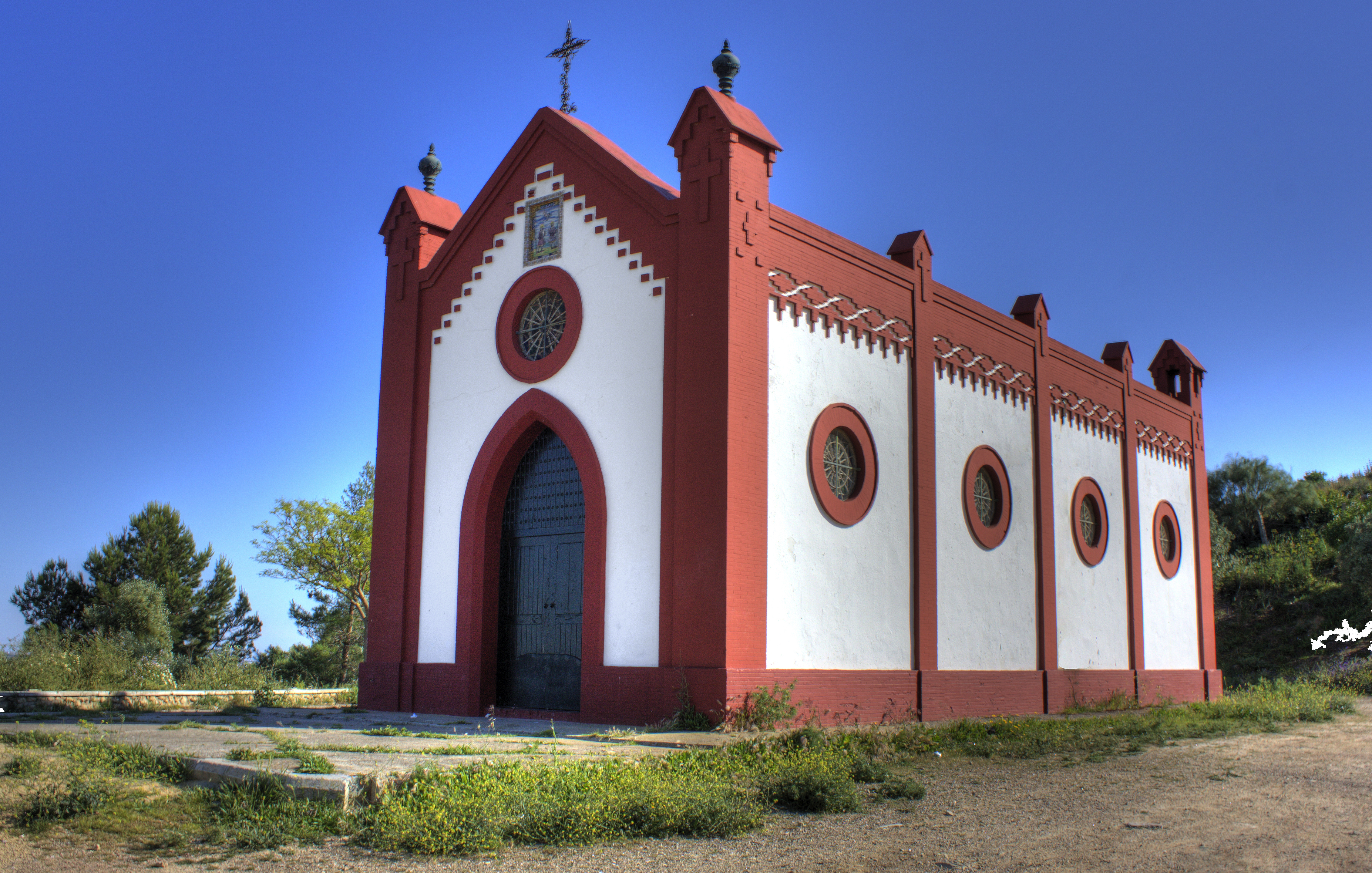 Ermita del Cerro de los Martires (San Fernando)